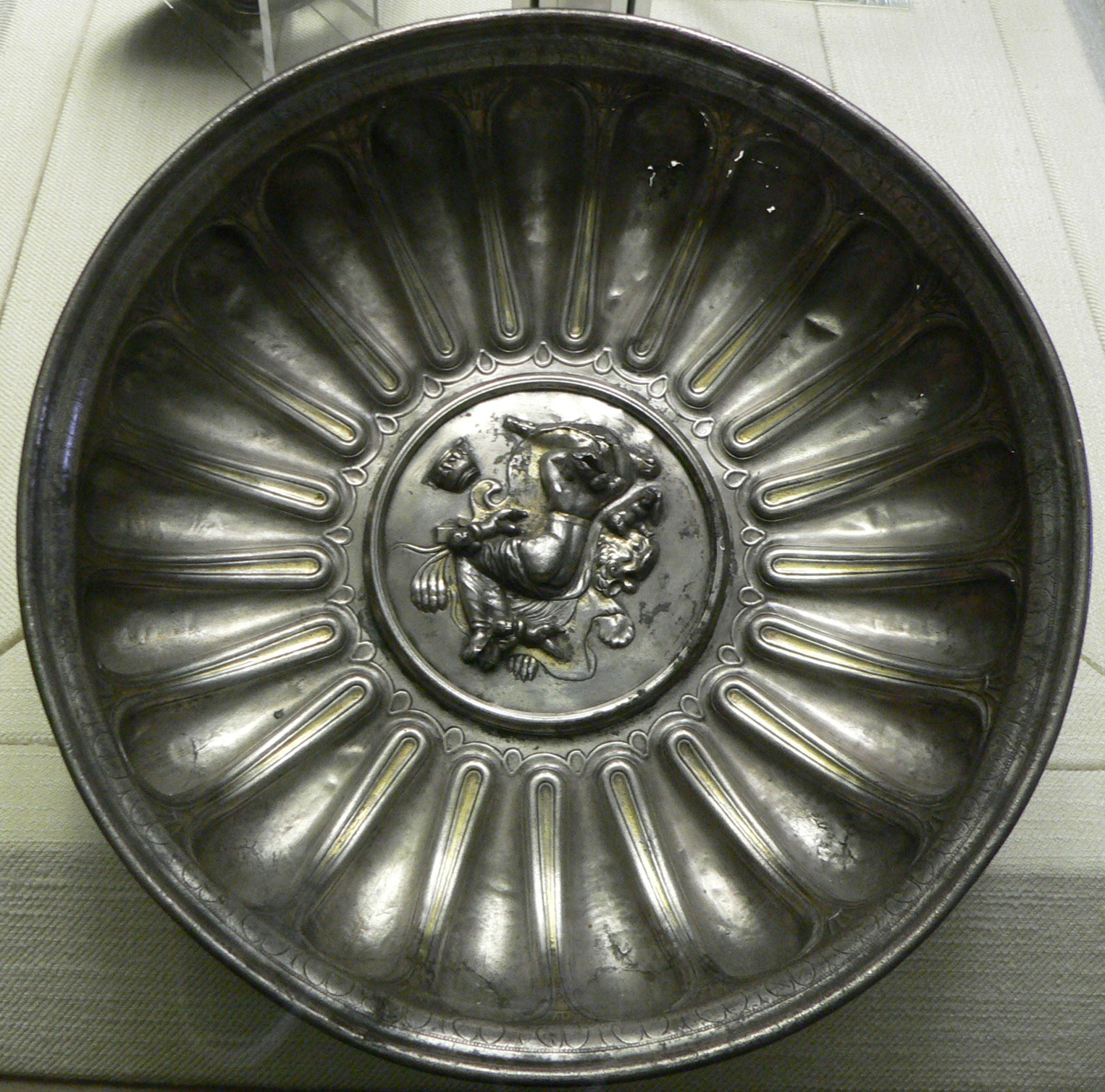 Bassin côtelé Trésor de Berthouville, argent, 1ère moitié du Ie siècle ap. J.-C.Décor: Au centre, Omphale endormie sur la peau du lion de Némée, vec la massue et l'arc d'Hercule. Le bassin a été offert à Mercure par Quintus Domitius Tutus.